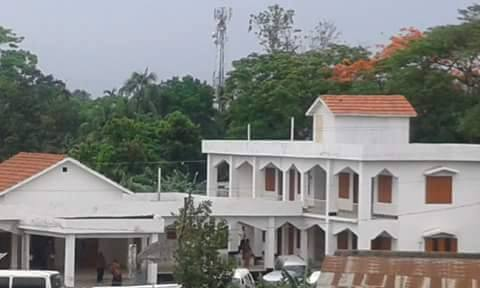 গুণবতী ইউনিয়ন পরিষদ ভবন